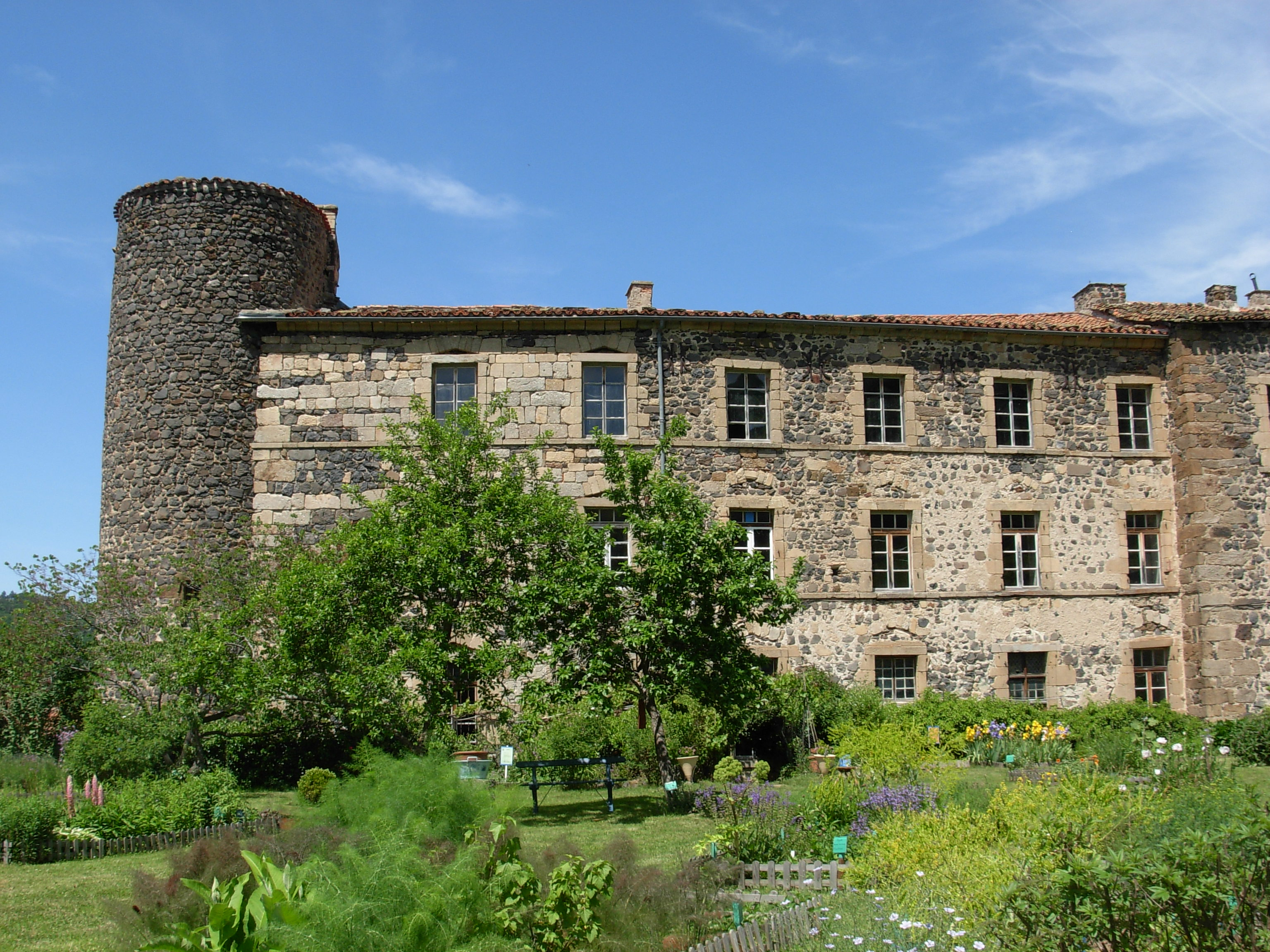 Vue de l'abbaye de Pébrac (Haute-Loire, France).